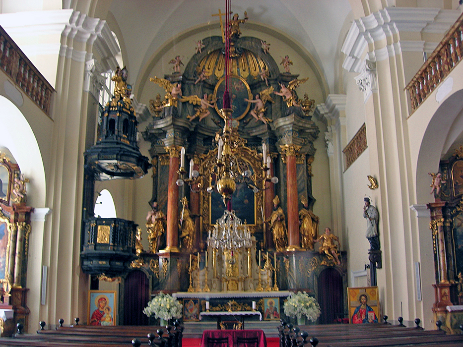 Dreifaltigkeitskirche, Graz. Innenansicht.